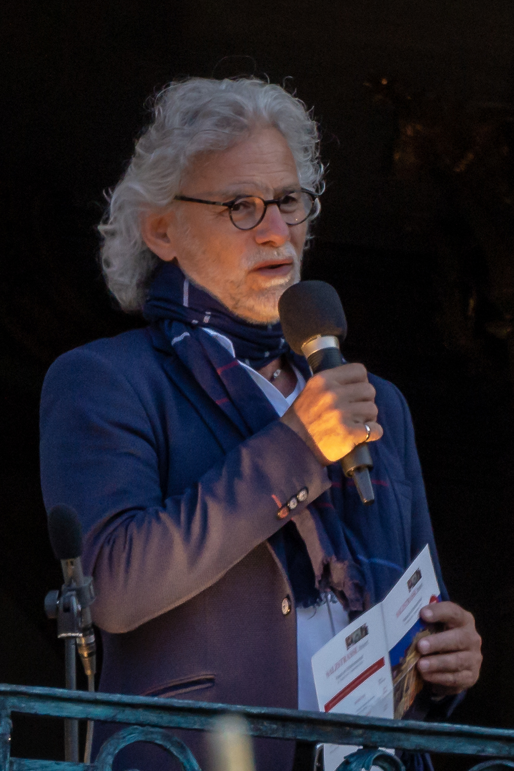 Salzstrasse feiert "Piazza am Erbdrostenhof". Mitglieder des Ensembles des Theater Münster: Generalintendant Ulrich Peters (links), Marielle Murphy (Mitte)